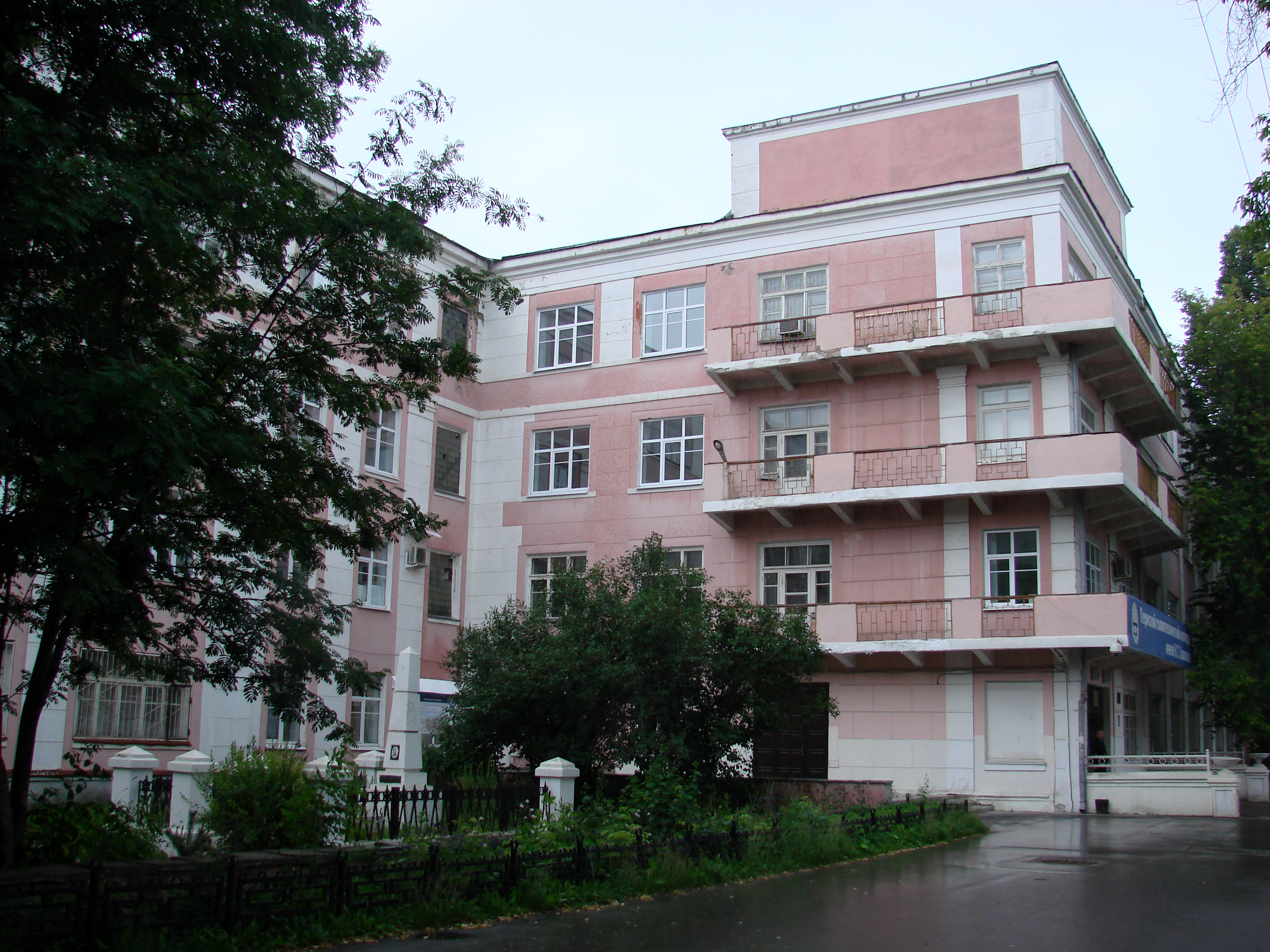 Здание механического техникума 1938 г. Пермь, улица Уральская, 78